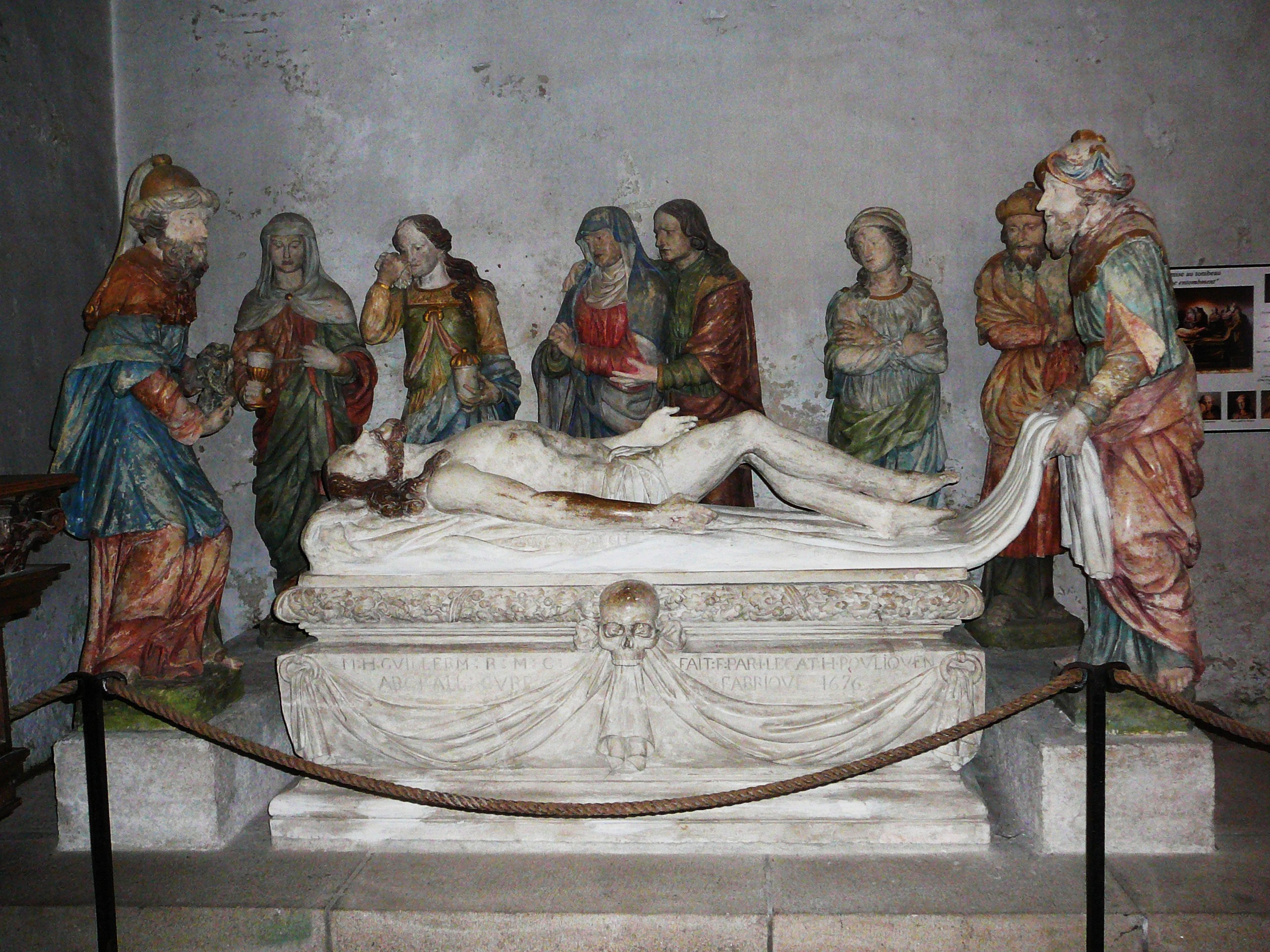 Lampaaul-Guimiliau : église Notre-Dame, la "Mise au tombeau", groupe statuaire du XVIIe siècle